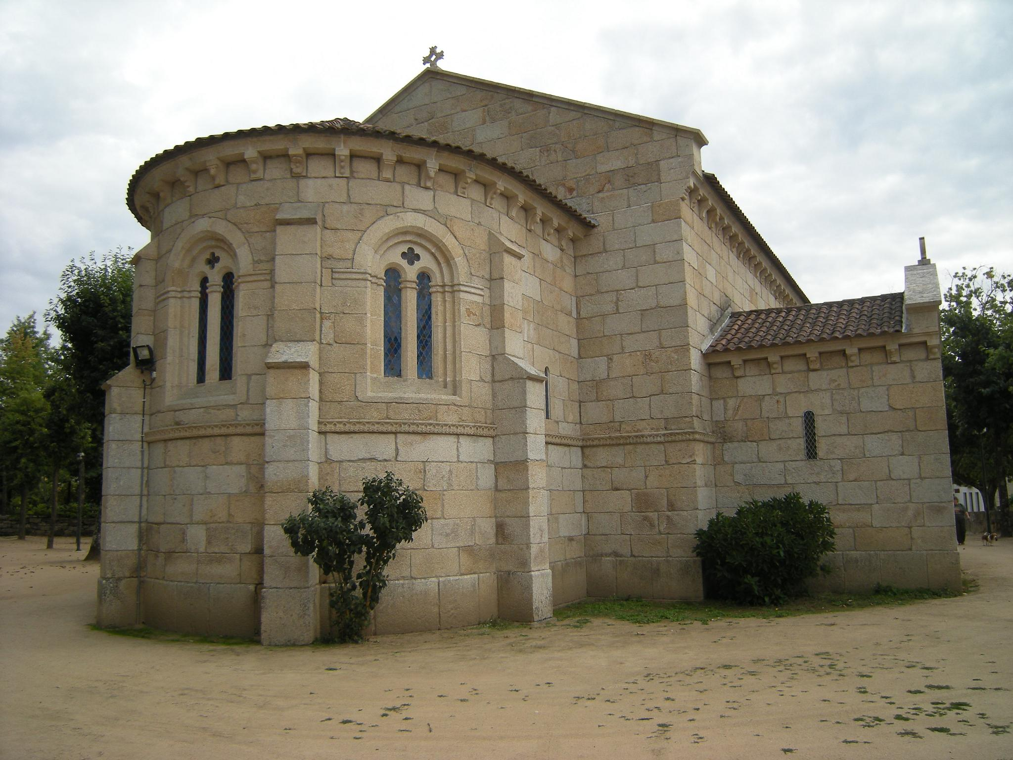 Igreja de Nossa Senhora da Conceição de Vidago (século XX) - Chaves - Portugal